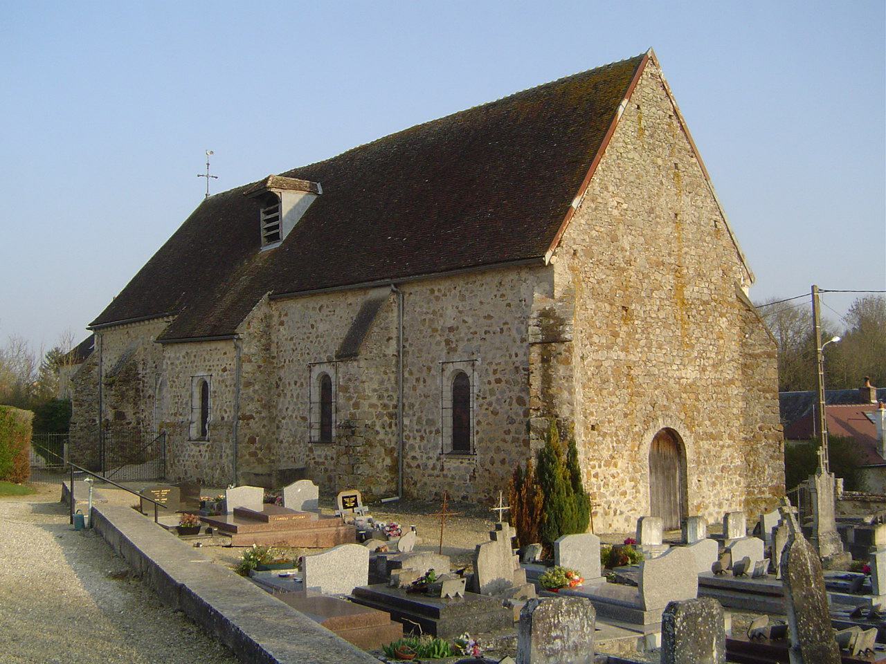 Bercenay-le-Hayer - L'église